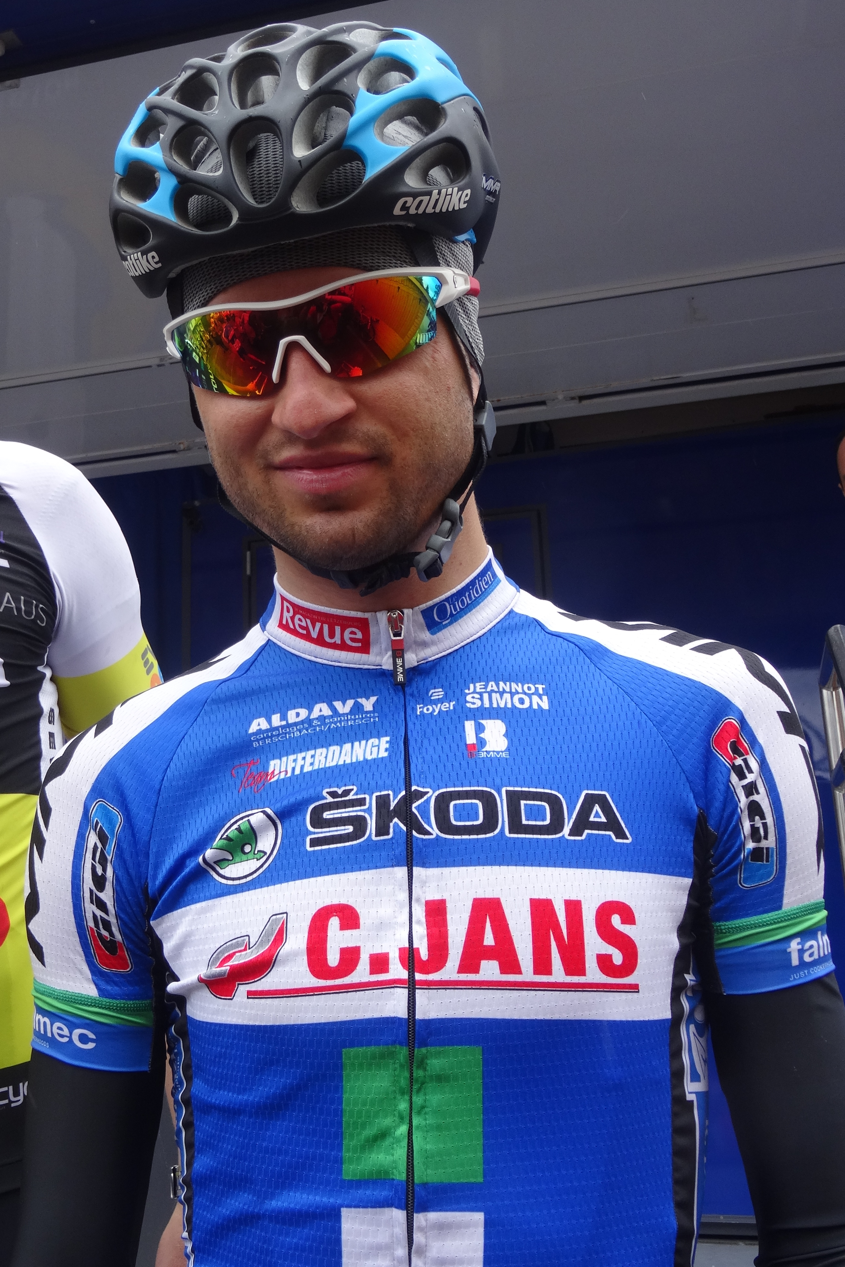 Reportage photographique réalisé le dimanche 13 juillet à l'occasion du départ et de l'arrivée de la Ronde pévéloise 2014 à Pont-à-Marcq, Nord-Pas-de-Calais, France.